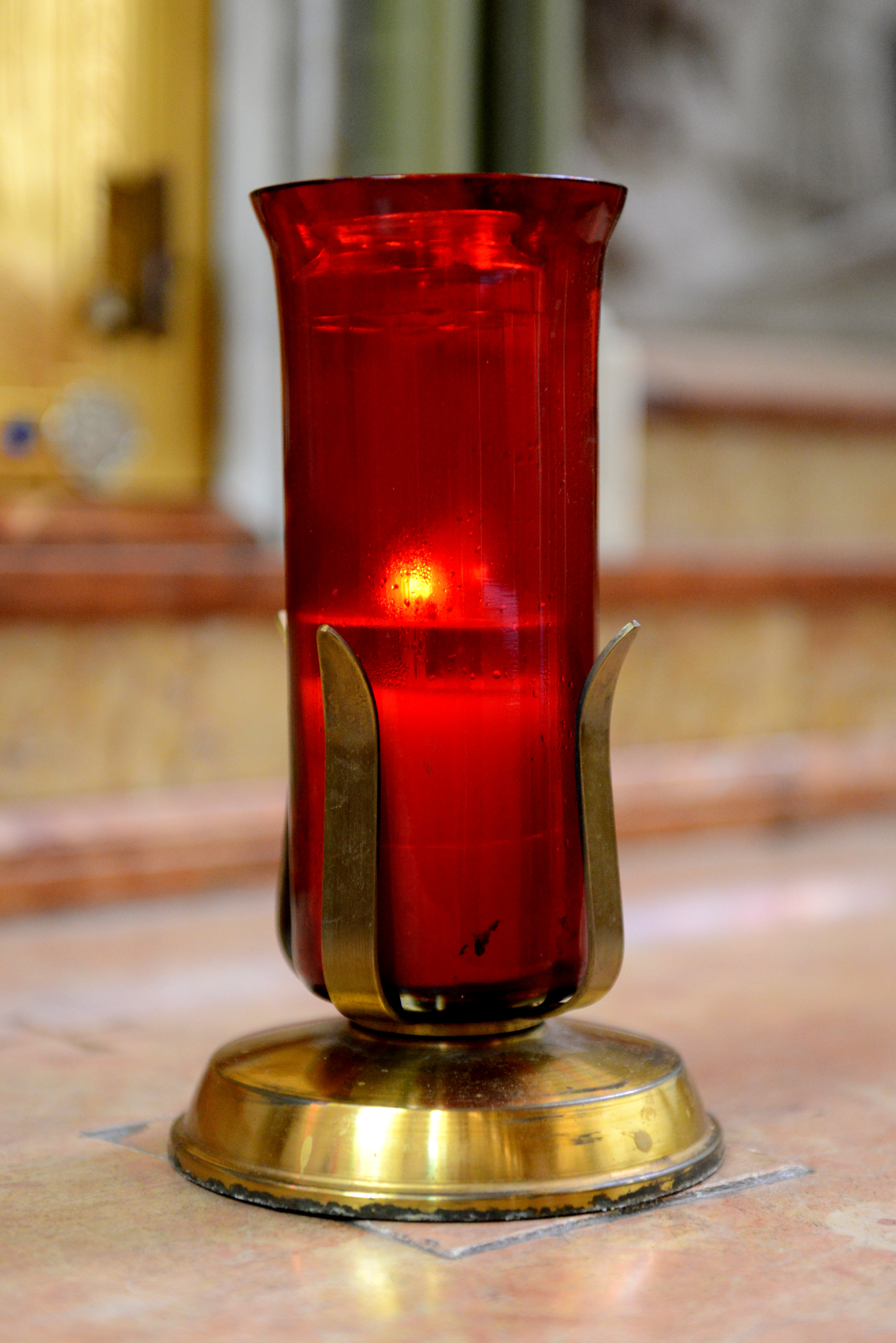 D'Éiwegt Liicht um Altor an der Beetebuerger Kierch.